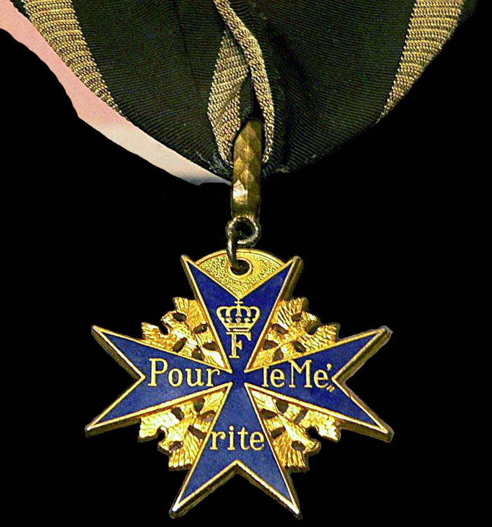 Pour Le Merite